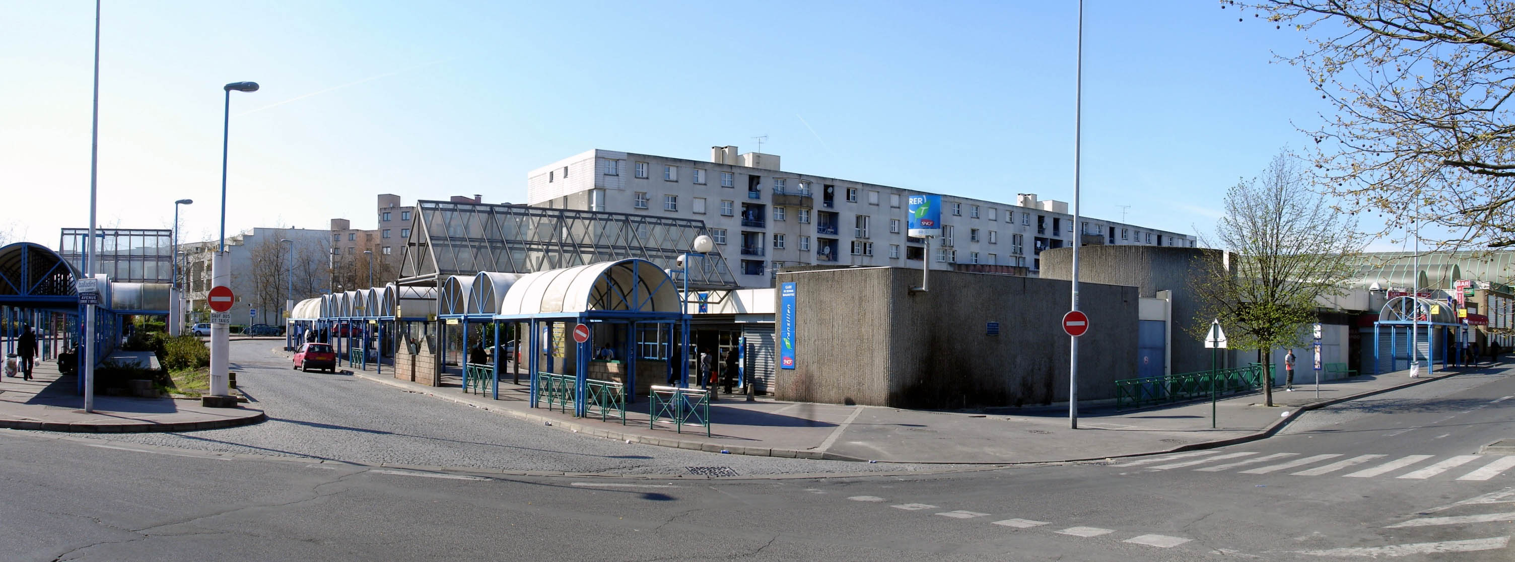 Gare de Sevran - Beaudottes à Sevran (Seine-Saint-Denis), France